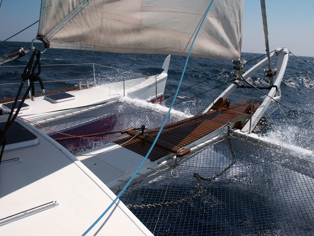 Pahi 63, Eigenbau-Katamaran, Takelage